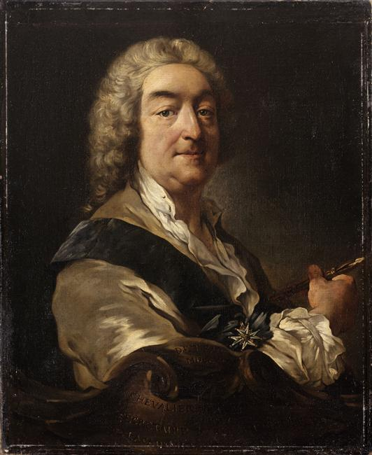 Alors directeur de l'Académie de France à Rome, portant le cordon et la croix de l'ordre de Saint-Michel en 1741